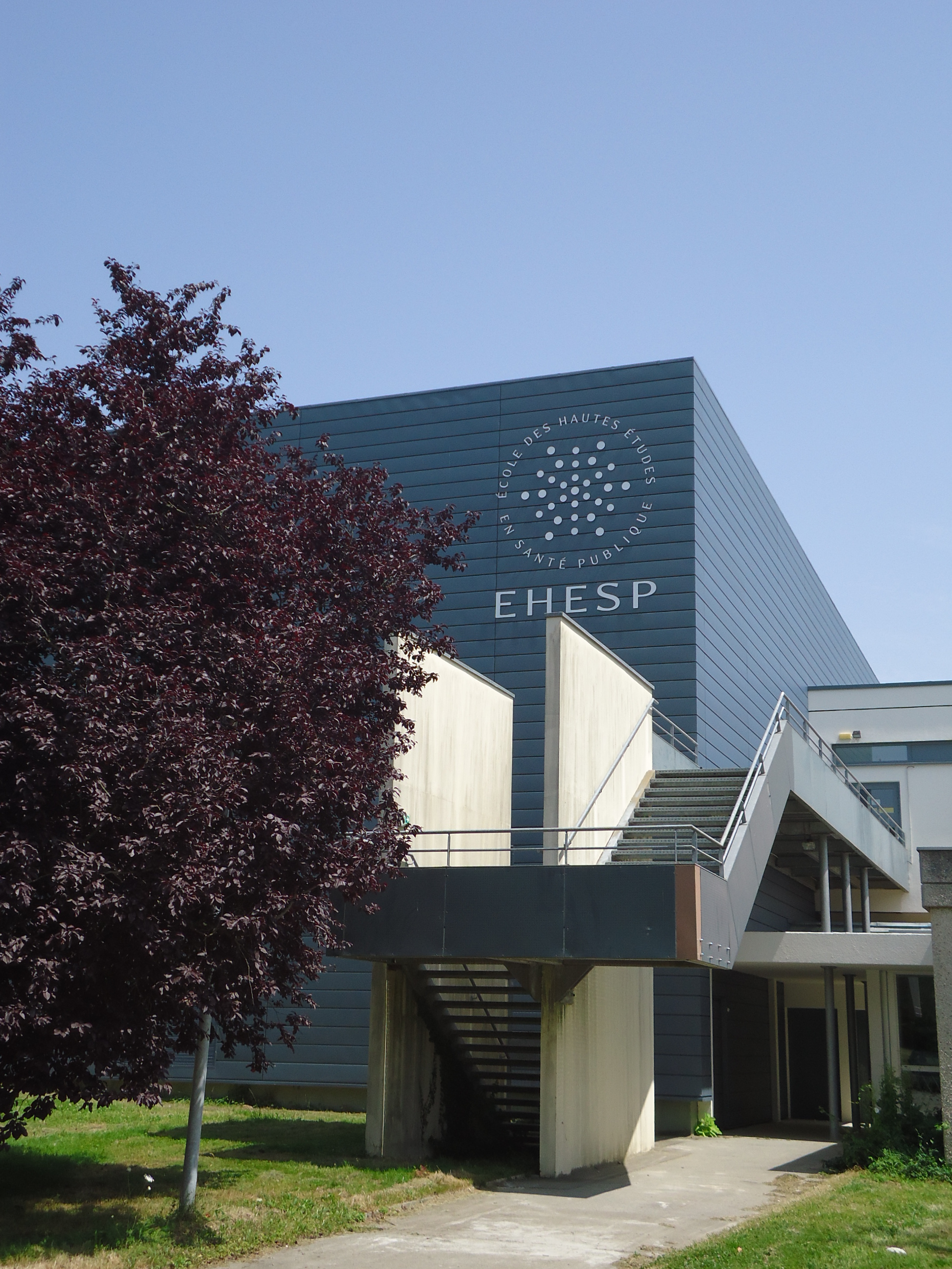 EHESP